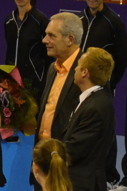 Jean-Marc Gabouty, sénateur-maire de Couzeix, lors de la remise des prix de l'Open de tennis de Limoges.